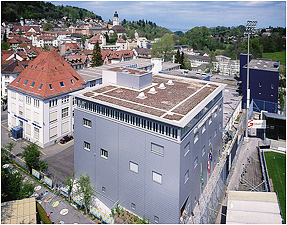 Luftaufnahme des Standorts St. Gallen